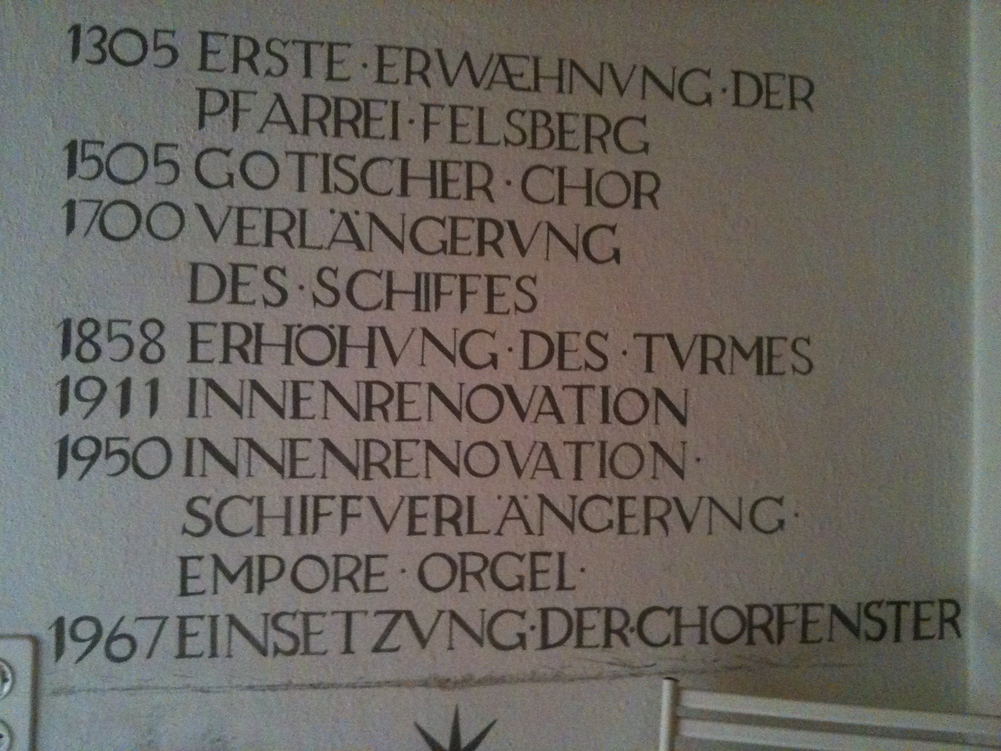 Hinter dem Portal der Felsberger Kirche - in die Wand eingravierte Kirchenchronik